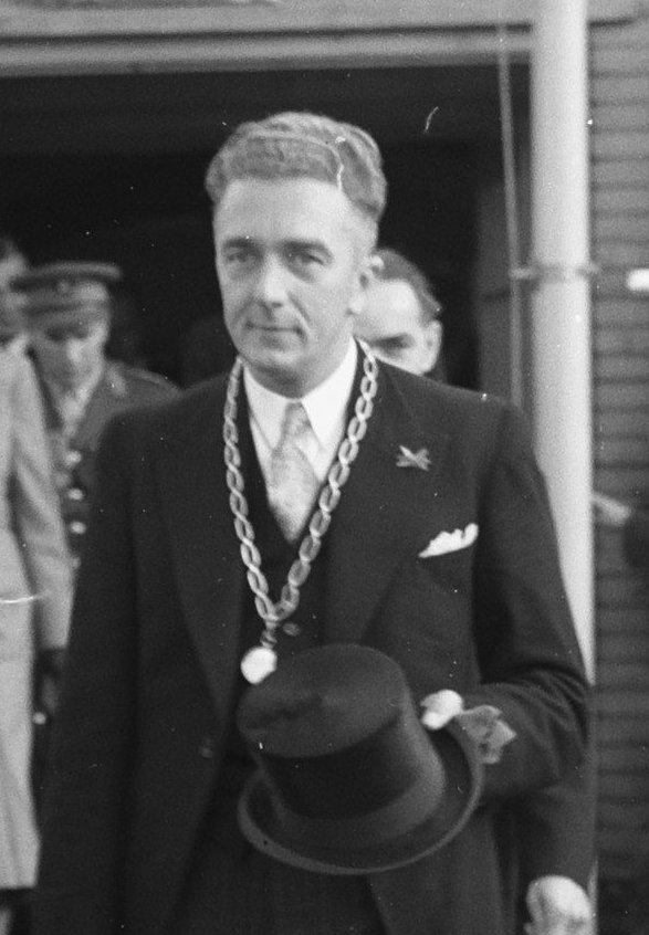 Collectie / Archief : Fotocollectie Anefo Reportage / Serie : [ onbekend ] Beschrijving : Serie: Bezoek van koningin Juliana en prins Bernhard aan Friesland Datum : 26 september 1950 Locatie : Friesland Trefwoorden : bezoeken, koninklijk huis Persoonsnaam : Juliana, koningin Fotograaf : Noske, J.D. / Anefo Auteursrechthebbende : Nationaal Archief Materiaalsoort : Glasnegatief Nummer archiefinventaris : bekijk toegang 2.24.01.09 Bestanddeelnummer : 904-2126